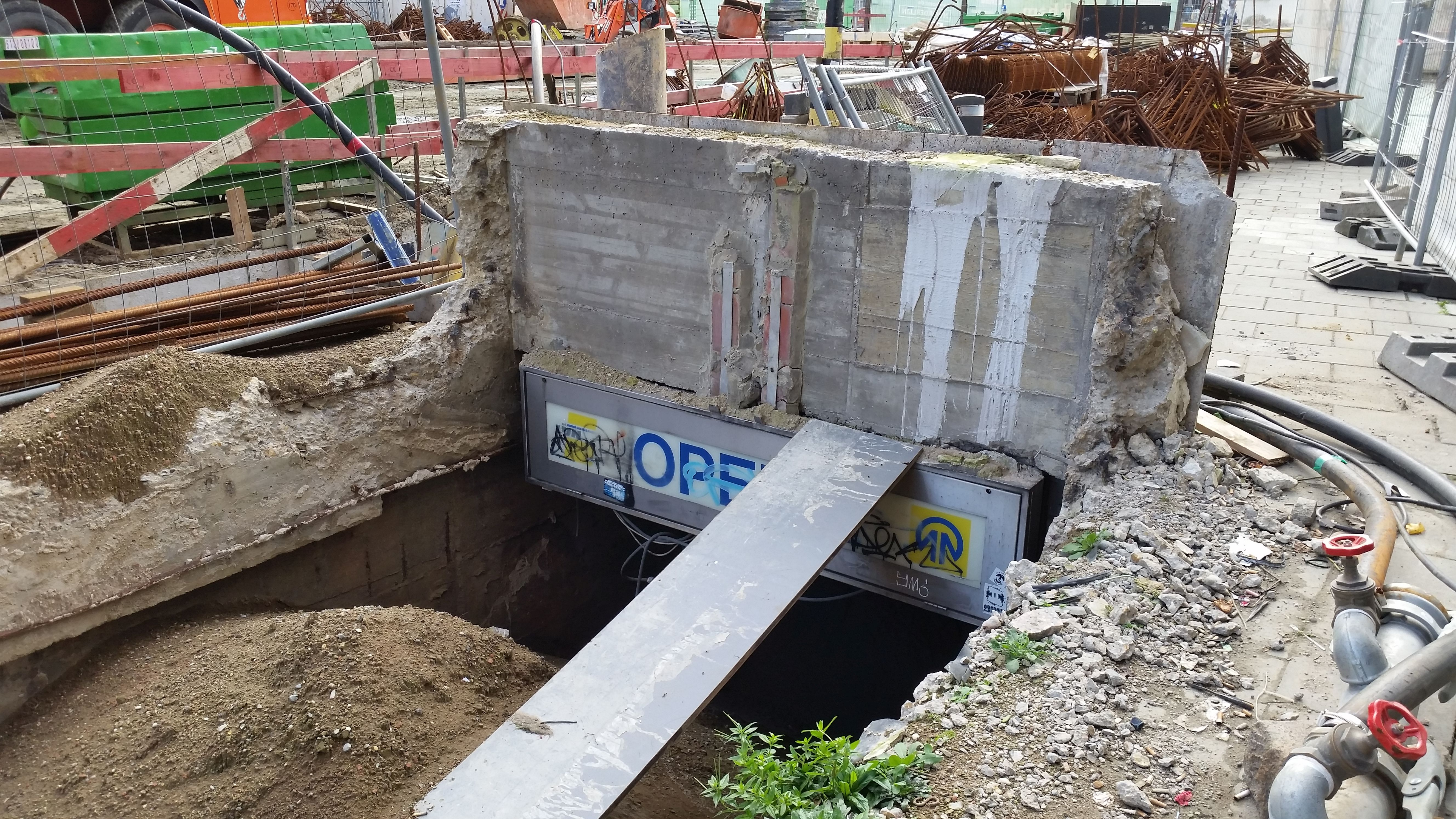 Gura stației de premetrou Opera din Antwerpen pe 29 octombrie 2017, în timpul lucrărilor la proiectul Noorderlijn.